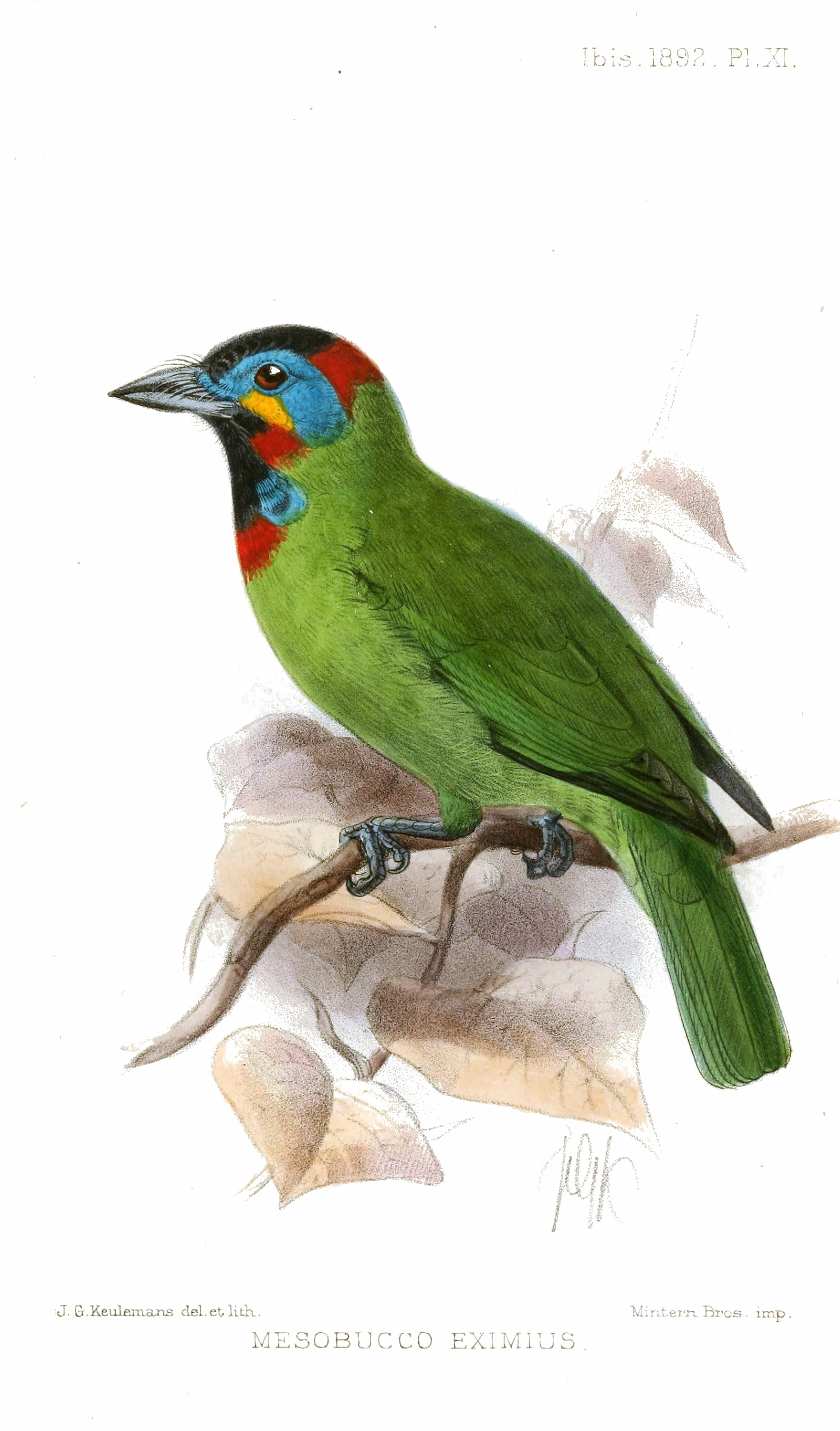 Mesobucco eximius = Megalaima eximia